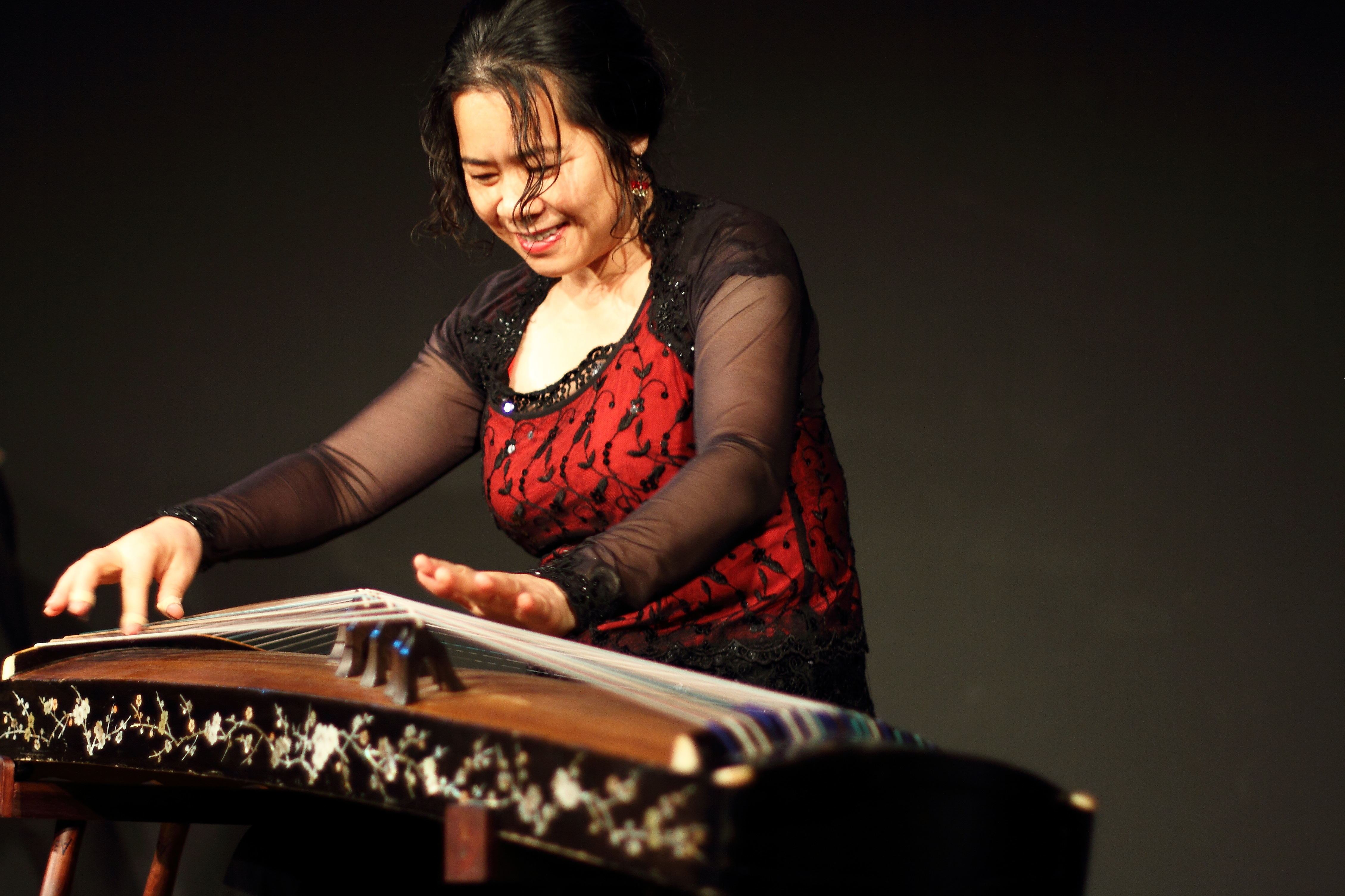 Das East-West Trio im KULT Niederstetten. Das frei improvisierende Trio besteht aus Xu Fengxia (guzheng, sanxian, voc), Didier Petit (cello) & Sylvain Kassap (cl).